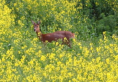 Reh im Rapsfeld